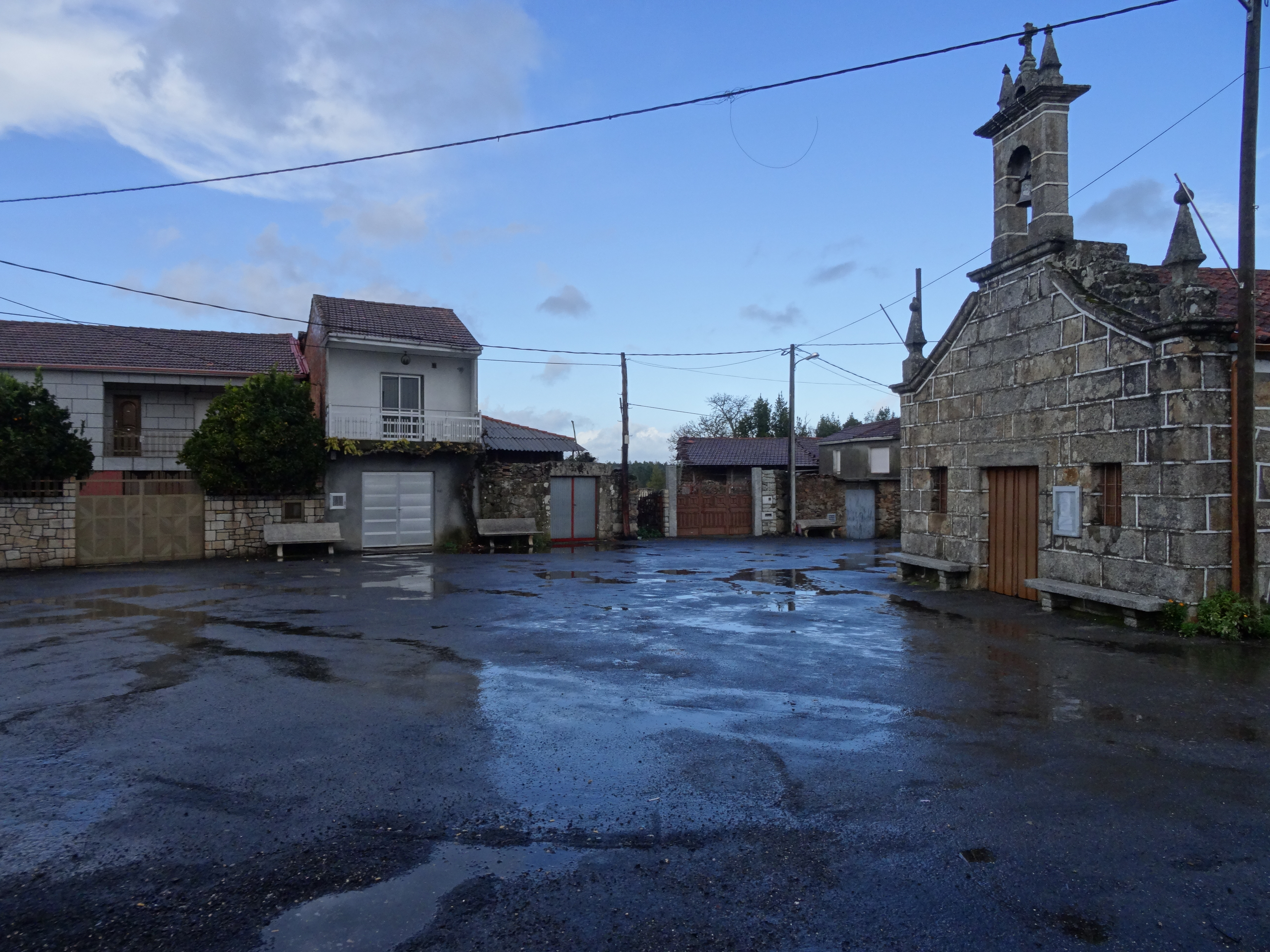 Ver título.